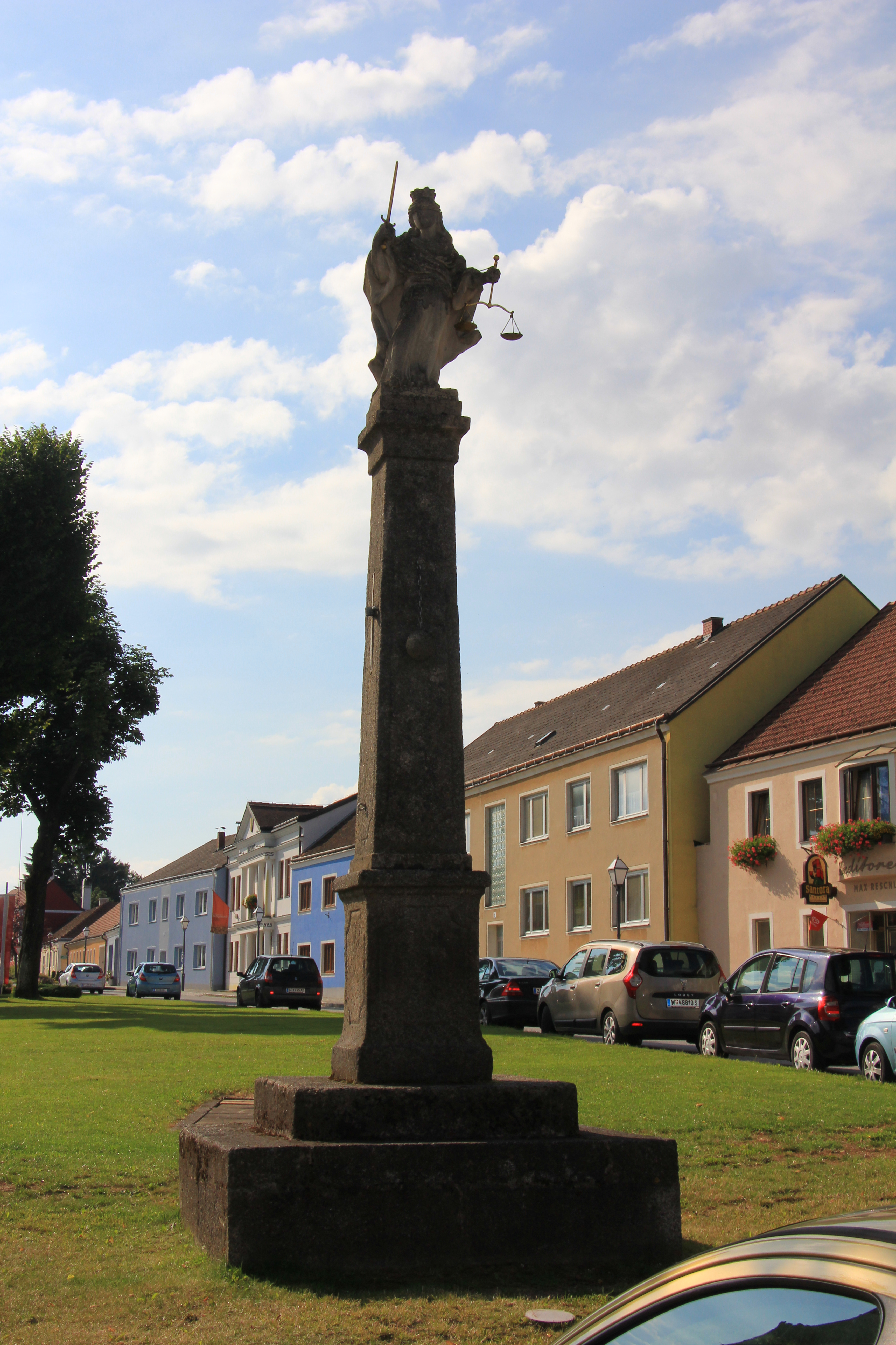 Pranger in Schweiggers